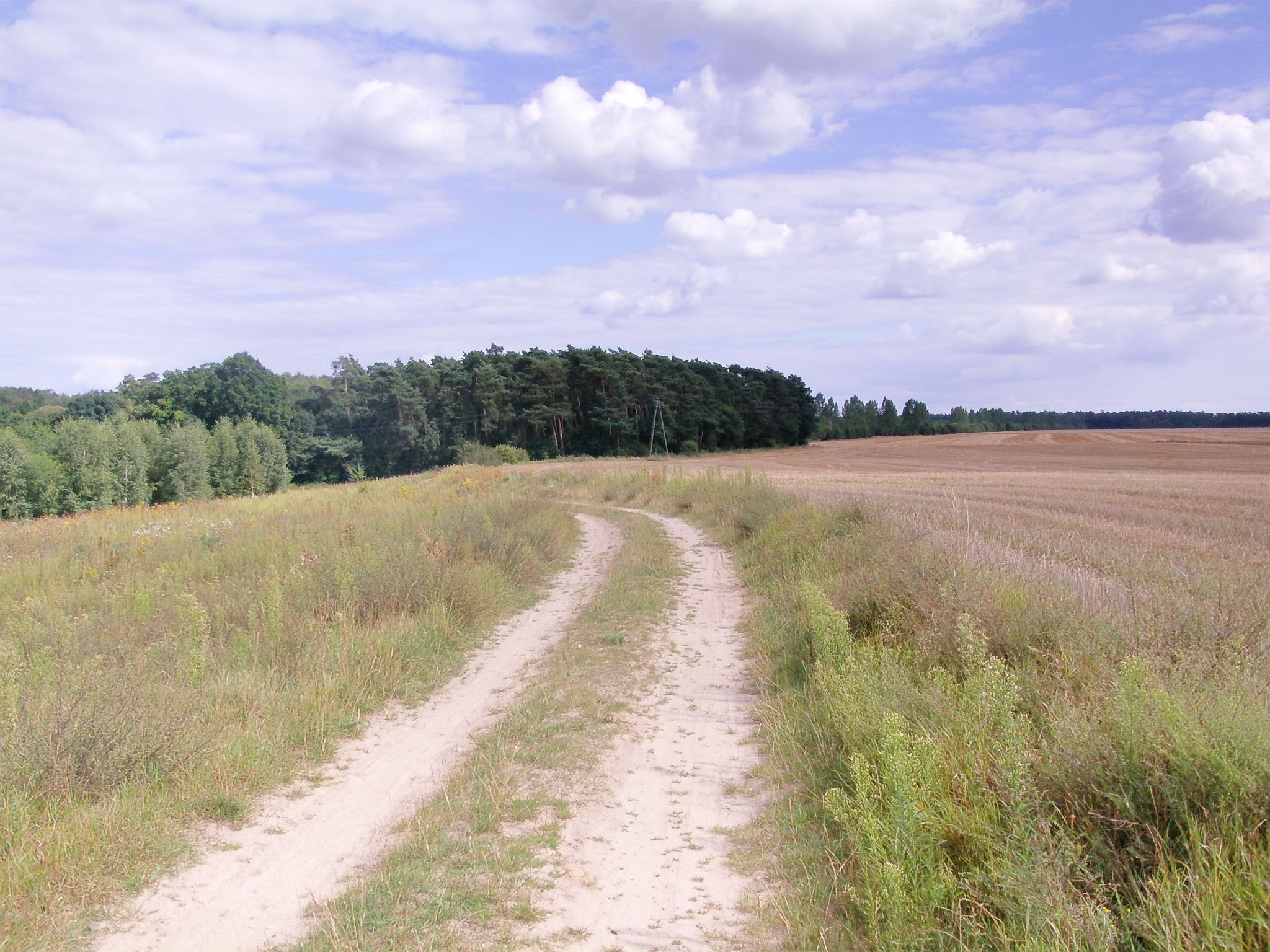 droga do Jarosławca